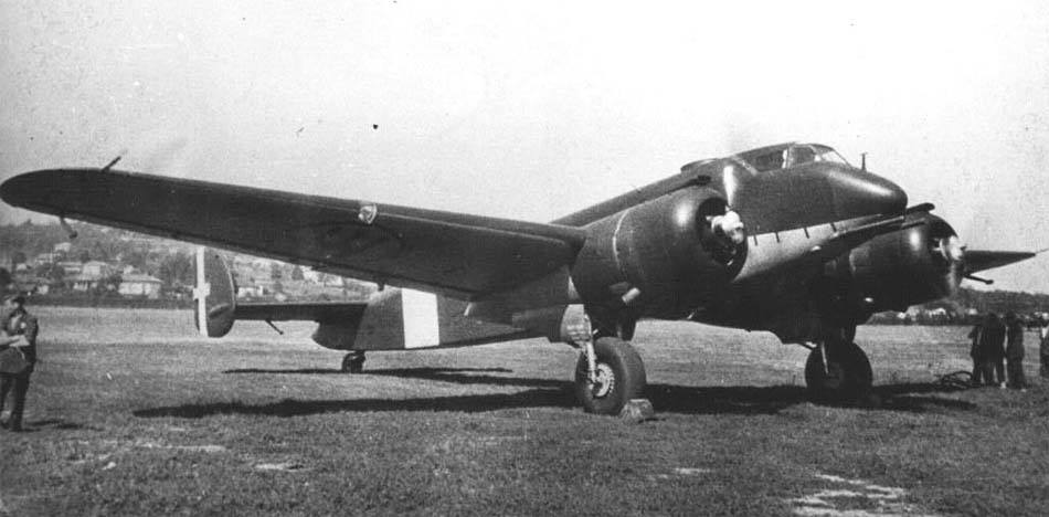 Aereo Savoia Marchetti Savoia-Marchetti SM.89